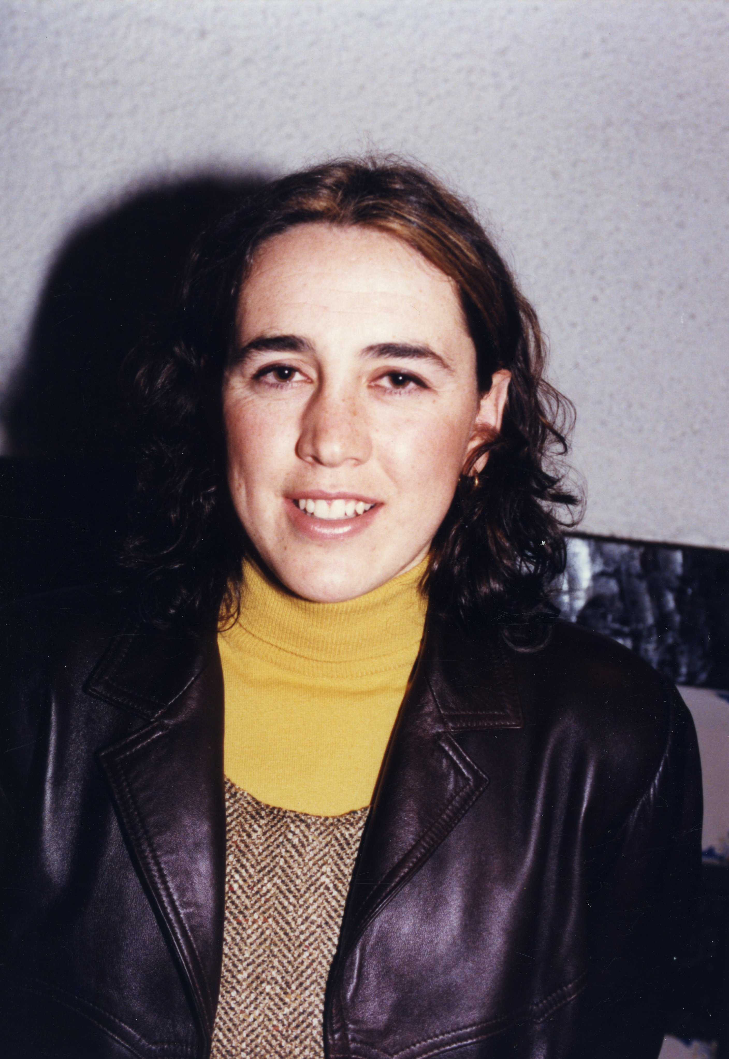 Aiurri 71 zbk. 16. orr.